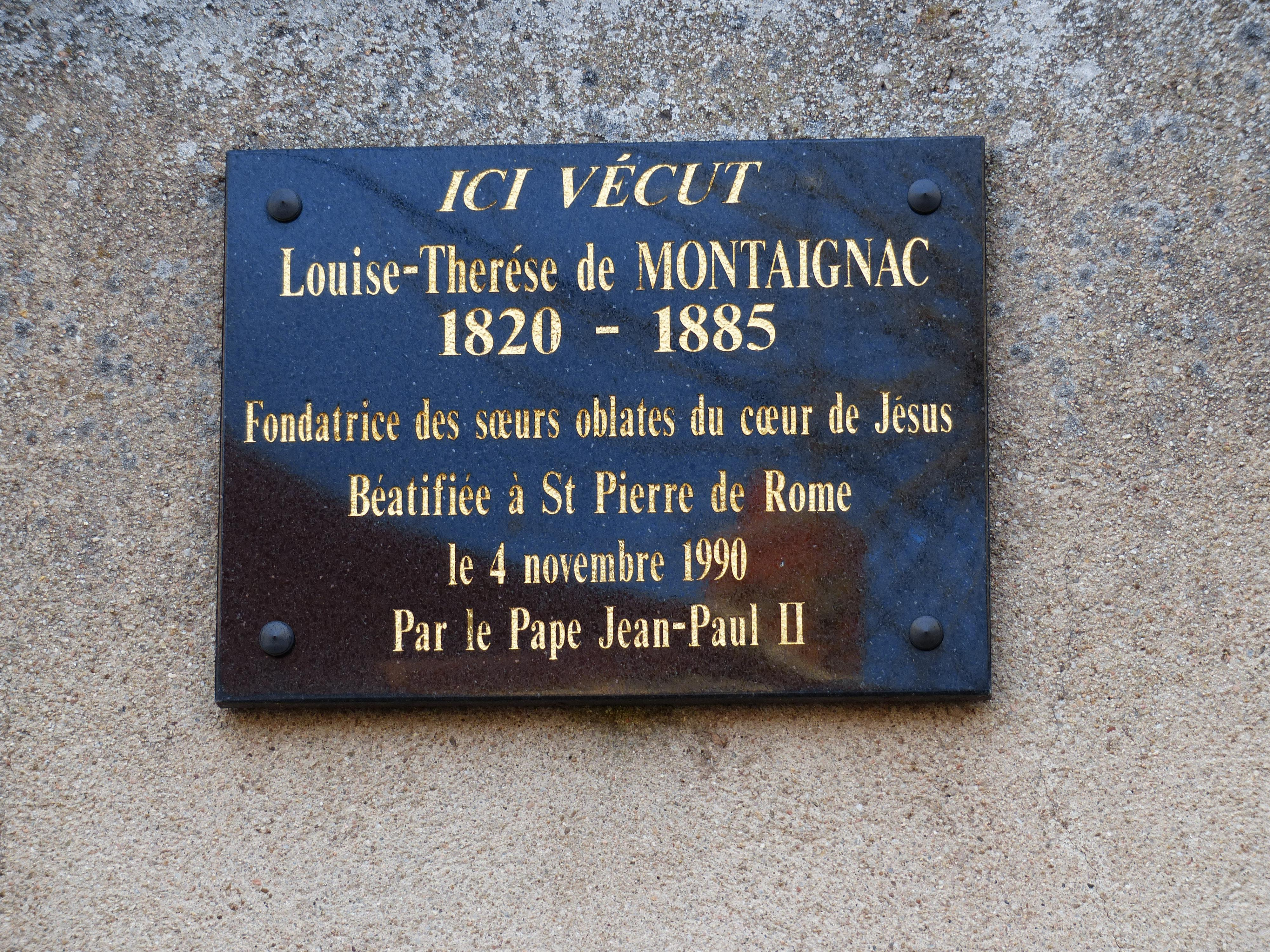 Estivareilles (Allier). Plaque rappelant Louise-Thérèse de Montaignac sur la maison de la famille.